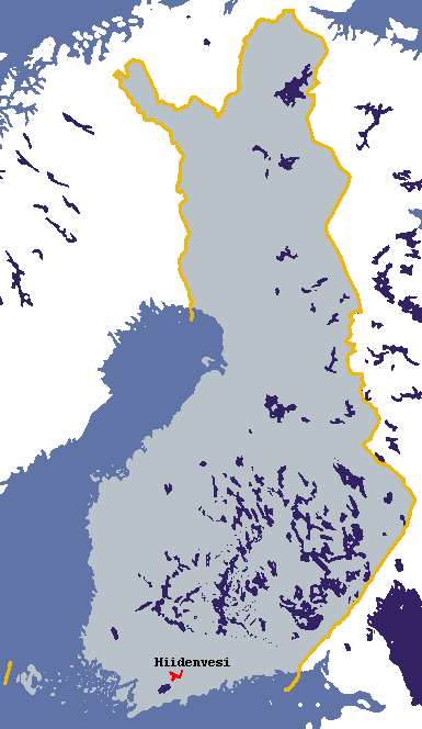 Hiidenveden sijainti Suomessa * Läget för Hiidenvesi i Finland * Location of lake Hiidenvesi in Finland